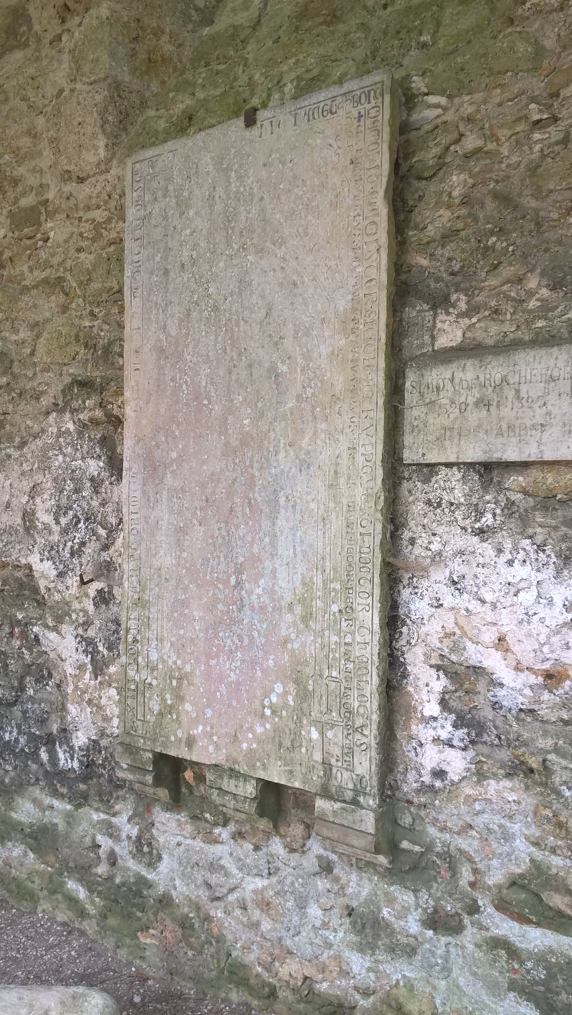 Dalle funéraire abbé église de l'abbaye des Vaux-en-Cernay